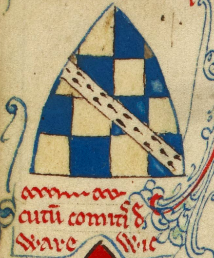 Inverted shield of Thomas, earl of Warwick